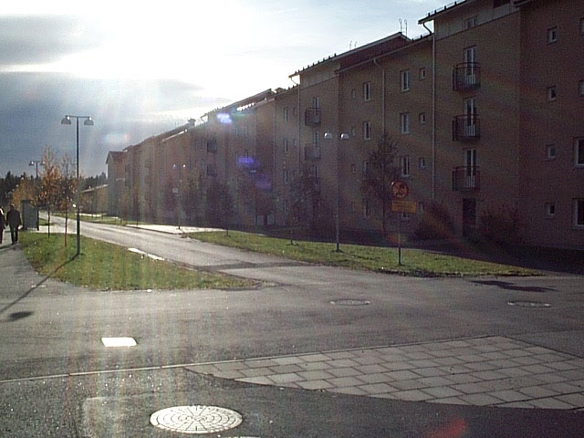 The street Vättarnas allé at Tomtebo, Umeå, Sweden